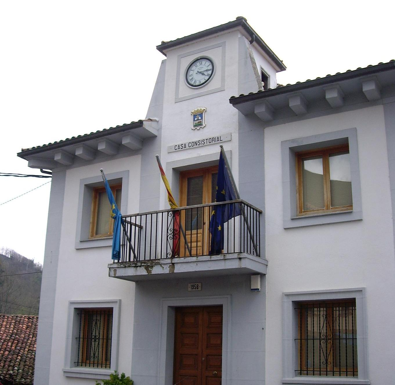 Ayuntamiento de Yernes y Tameza en Villabre (Asturias).